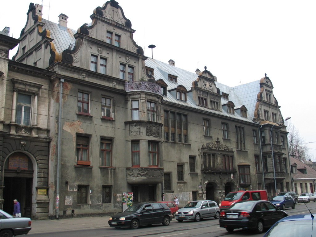 Pałac braci Karola i Emila Steinertów w Łodzi